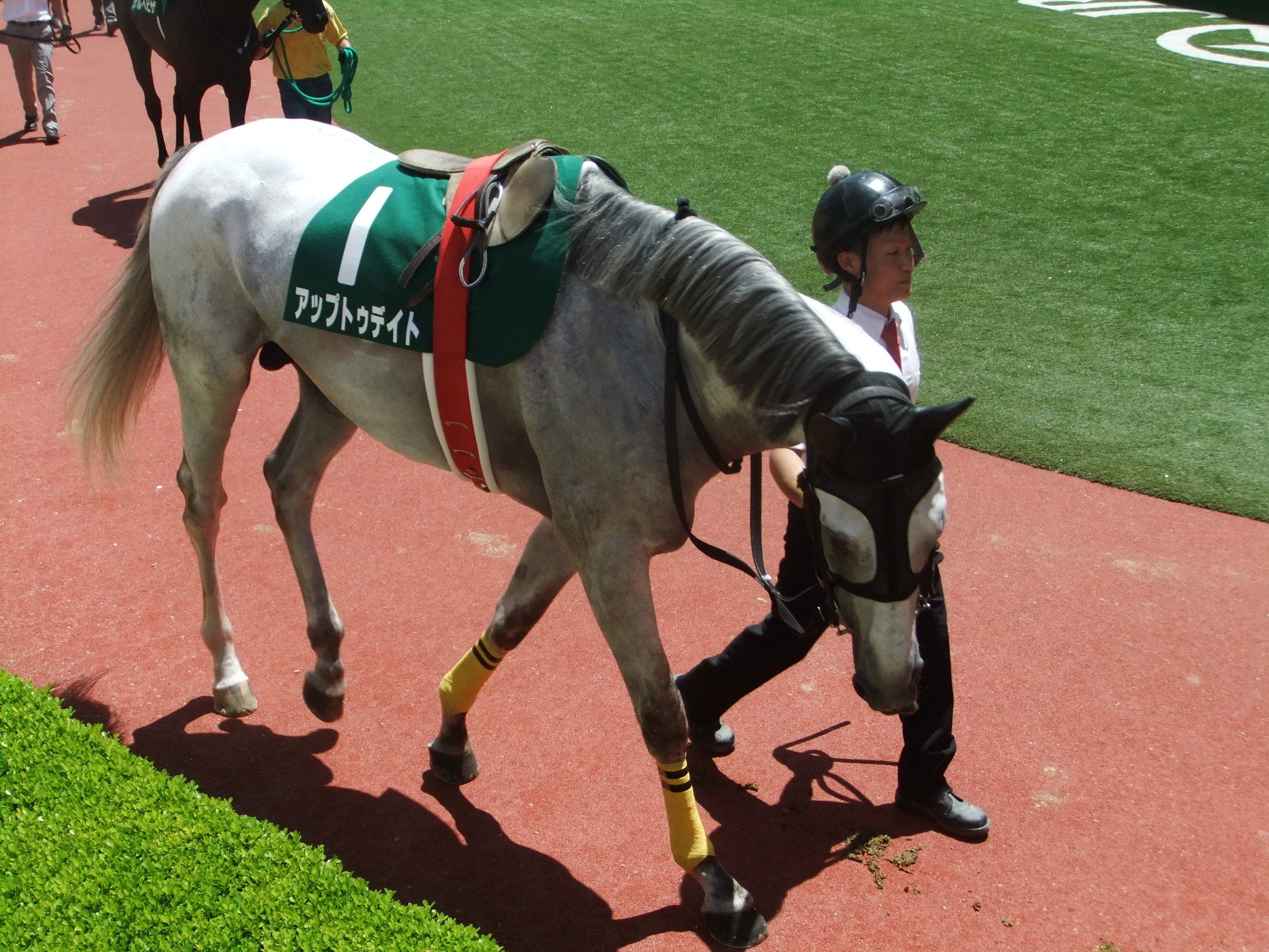 アップトゥデイト号 2015年8月1日 小倉競馬場